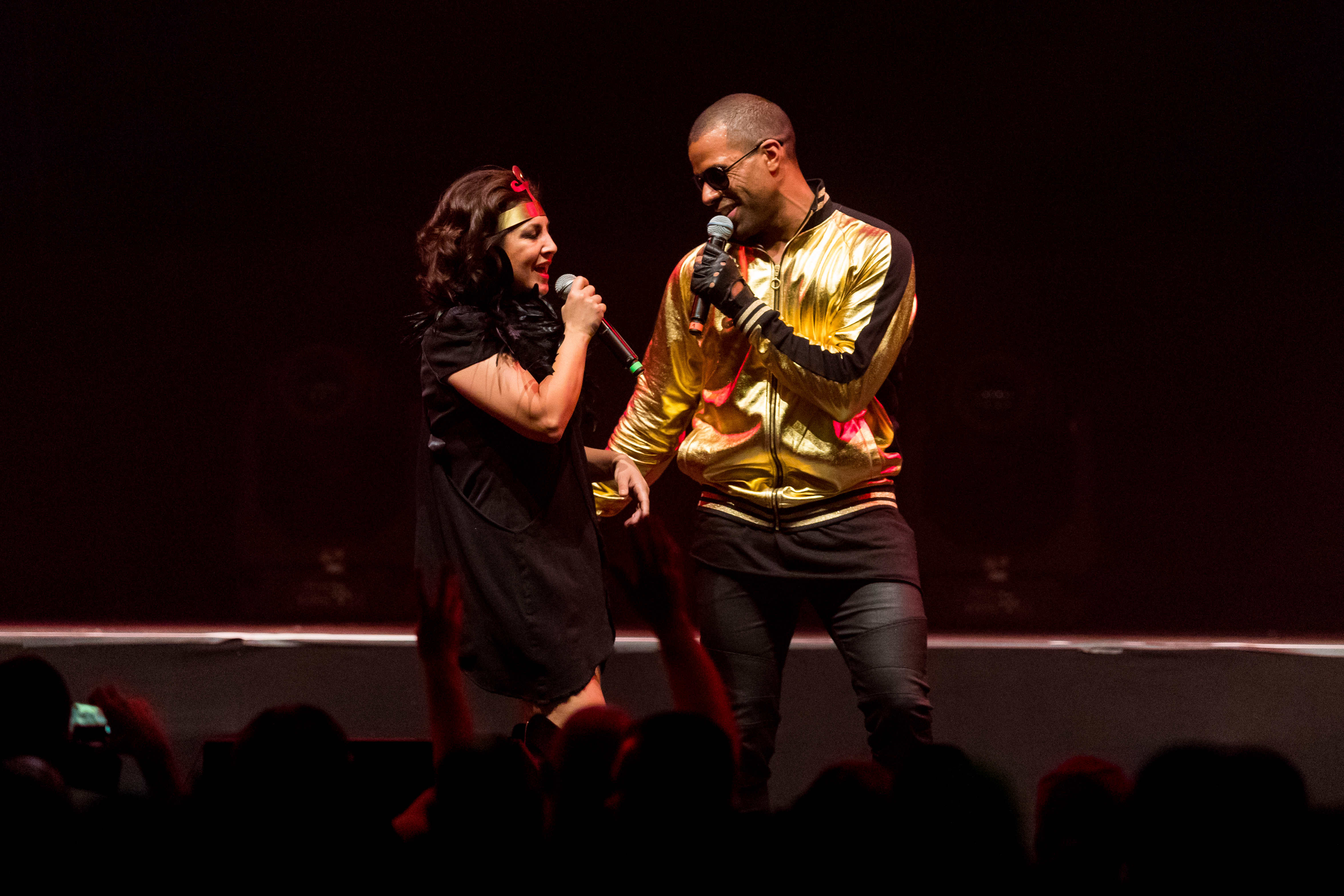 Pharao during Sunshine Live - Die 90er Live on Stage at Maimarkthalle & Maimarktclub, Mannheim, Baden-Württemberg, Germany on 2017-11-25, Photo: Sven Mandel